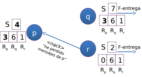 Estructura de la multidifusión fiable